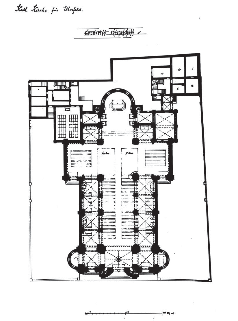 Grundriss der katholischen Kirche für Elberfeld, Nachlass von Th. Roß (Historisches Archiv der Stadt Köln)